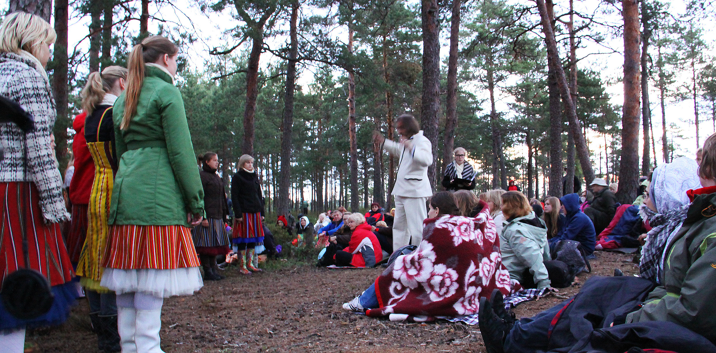 ETV Tütarlastekoor Aarne Saluveeri juhatusel esinemas XIV Suure-Jaani Muusikafestivali Päikesetõusukontserdil Hüpassaare soosaarel.